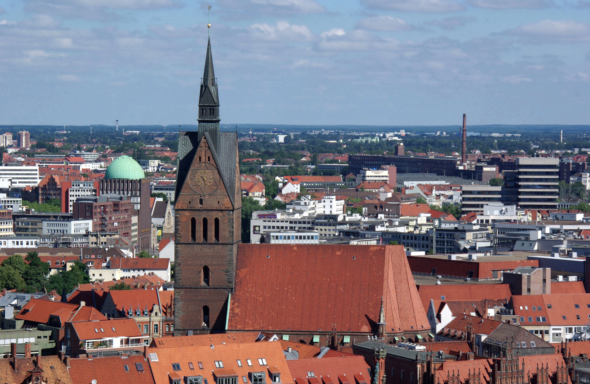 Hannover in Niedersachsen. Die Marktkirche in Hannover ist die älteste der drei Pfarrkirchen in der Altstadt von Hannover. Die Aufnahme ist vom Rathausturm aufgenommen.